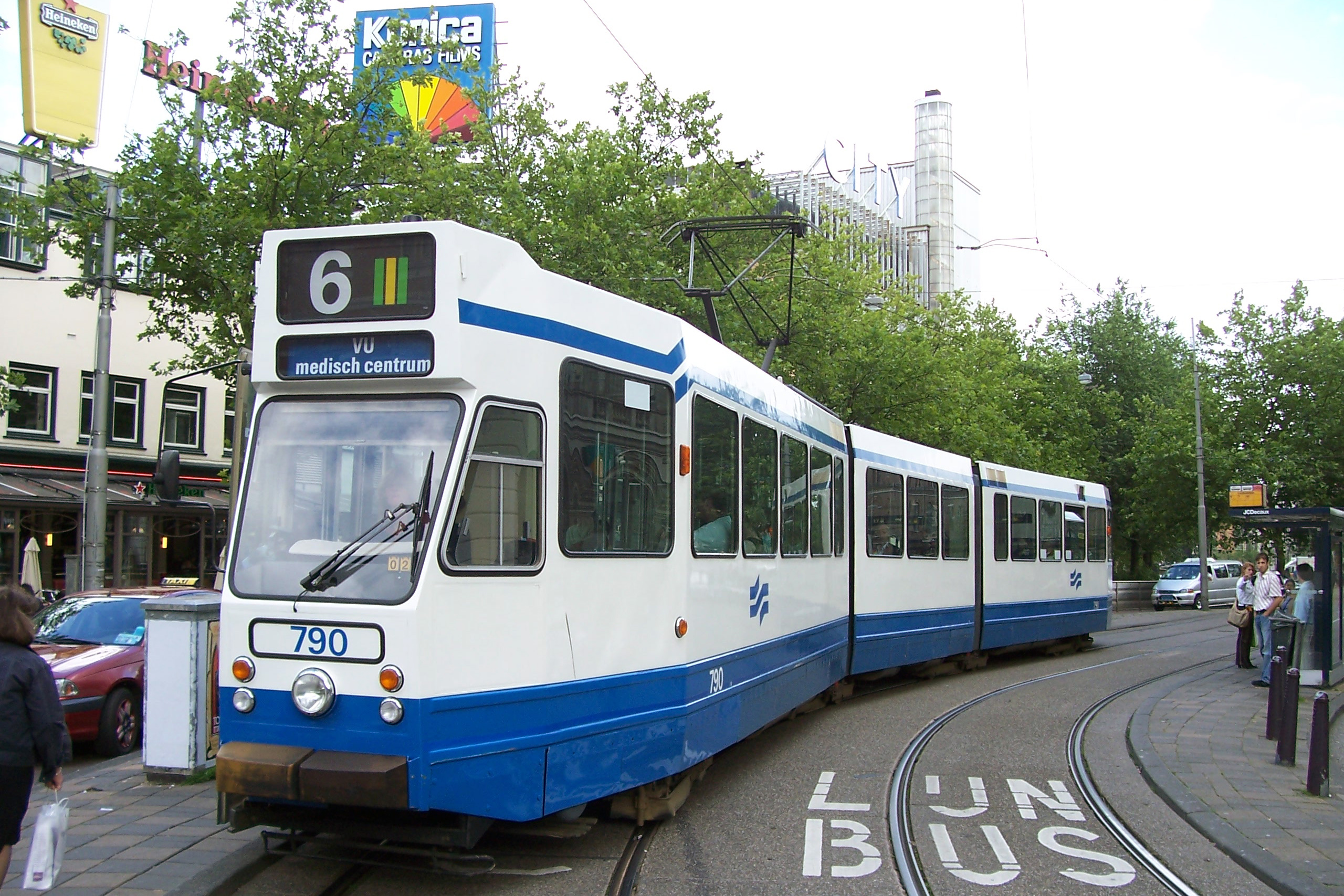 9G tram 790 op het Kleine-Gartmanplantsoen in Amsterdam als lijn 6. Deze tram is inmiddels geëxporteerd naar Sarejevo. Op de achtergrond de glazen toren van City Theater